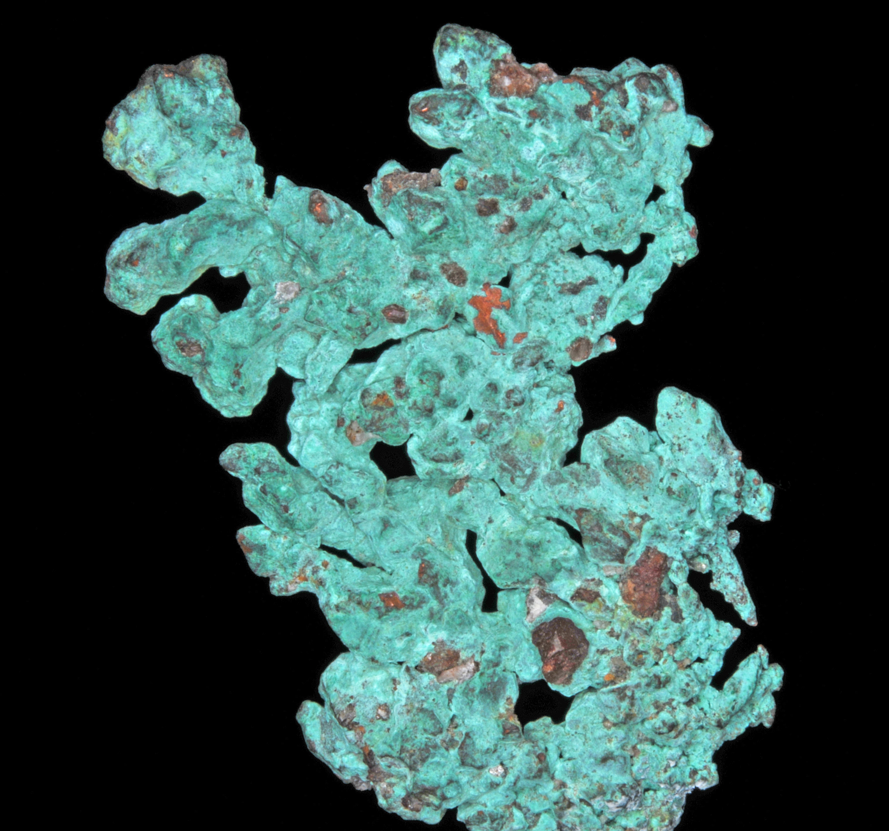 cristaux de cuivre natif : Oumjrane (Oumejrane, Oum-Jrana) Mine, Alnif, Tarhbalt, Er Rachidia Province, Meknès-Tafilalet Region, Morocco